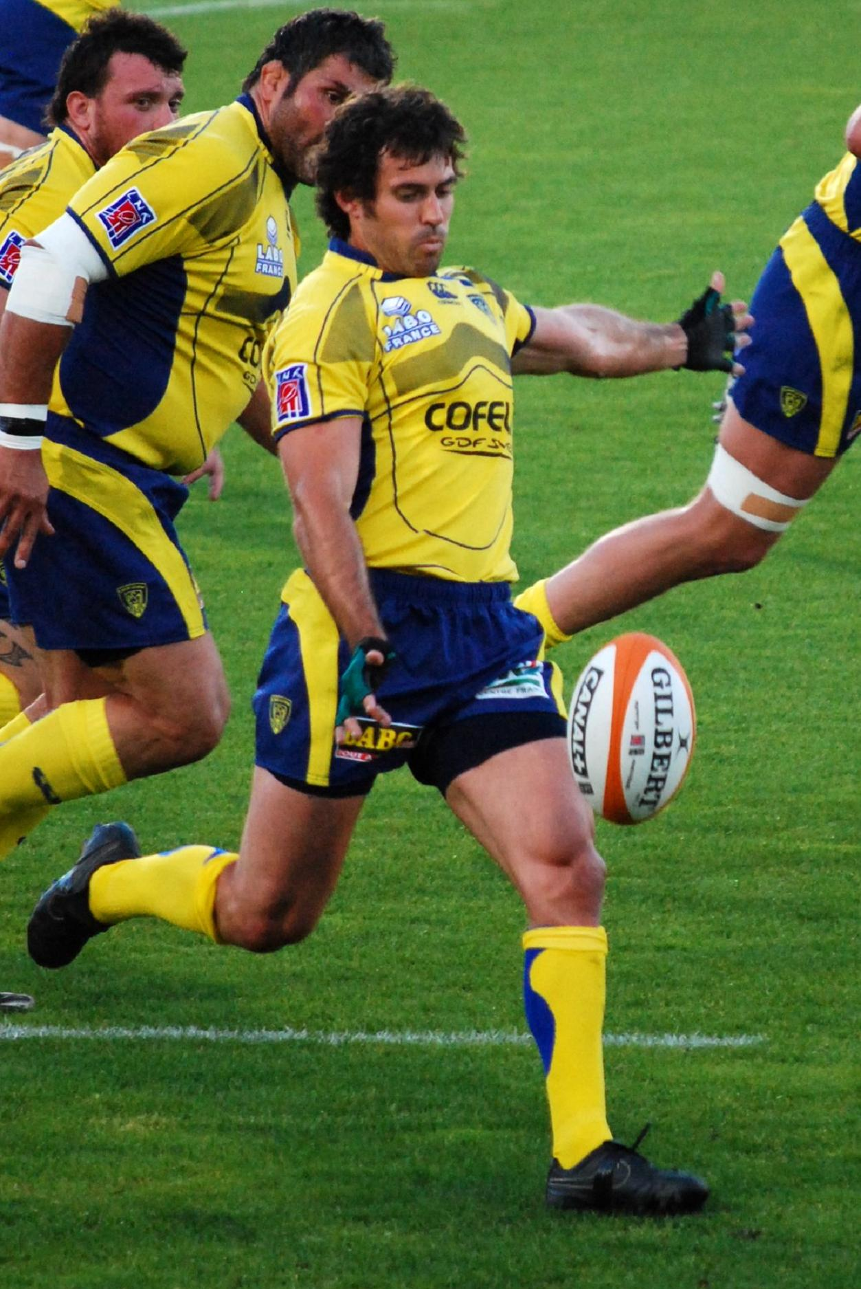 Depuis File:Brock James9.jpg. Brock James lors de la demi-finale de top 14 2008-2009 opposant Clermont à Toulouse.